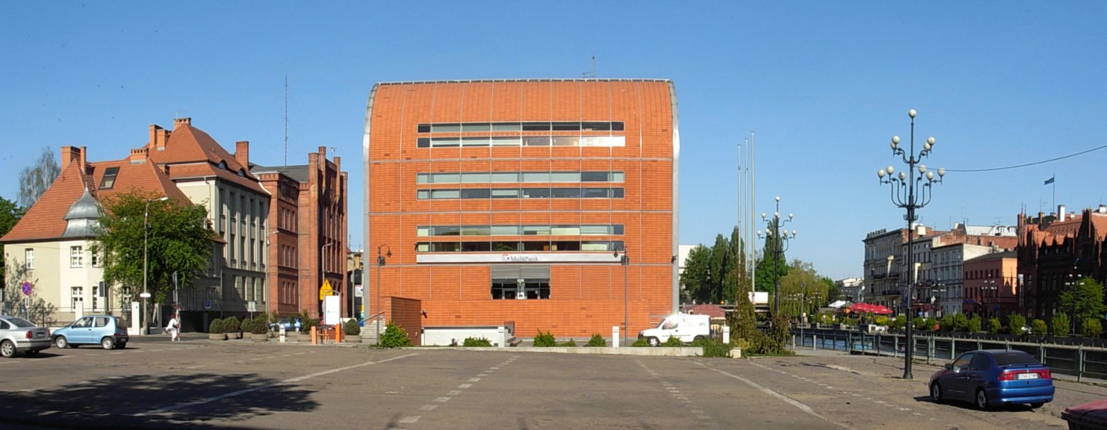 Plac Solny w Bydgoszczy